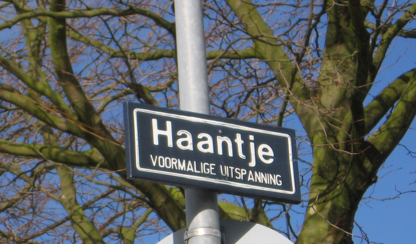 bord 't Haantje, Rijswijk